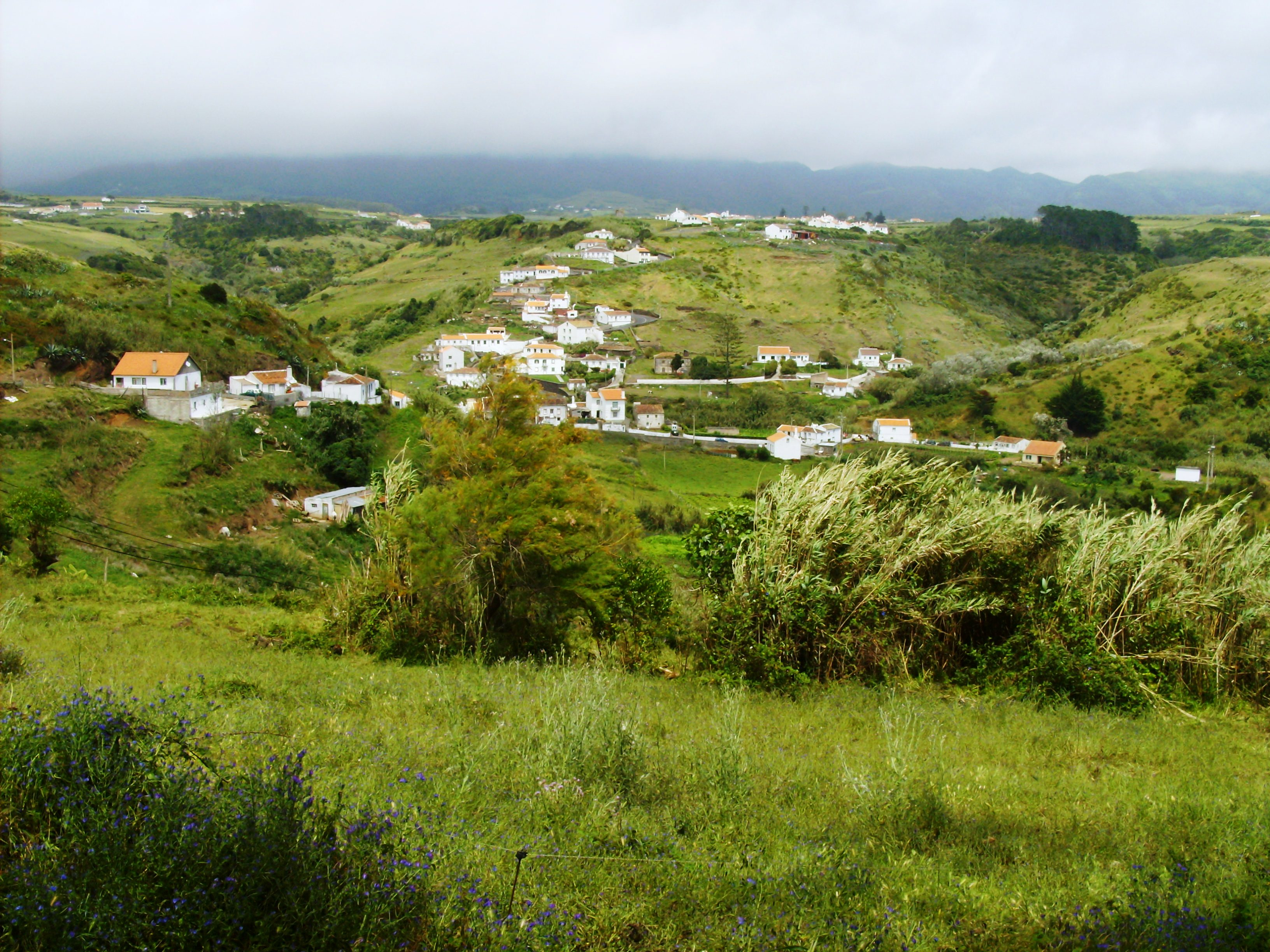 Valverde, freguesia de Vila do Porto, ilha de Santa Maria (Açores), Portugal.